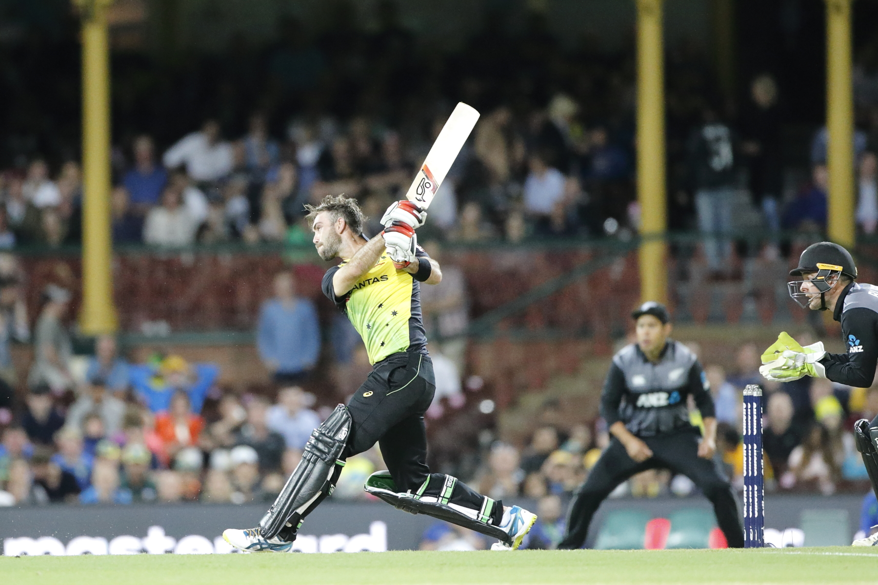 Glenn Maxwell batting during AUSvNZL T20